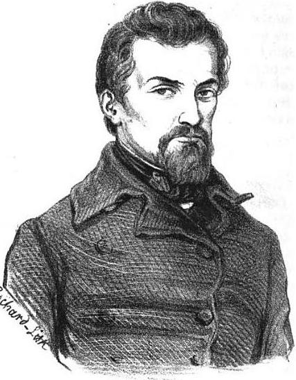 Alexandre Martin (1815-1895), dit « Albert ».